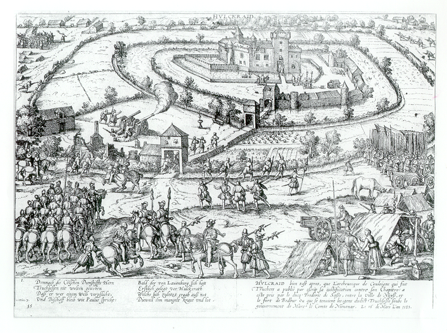 Belagerung von Hülchrath 1583